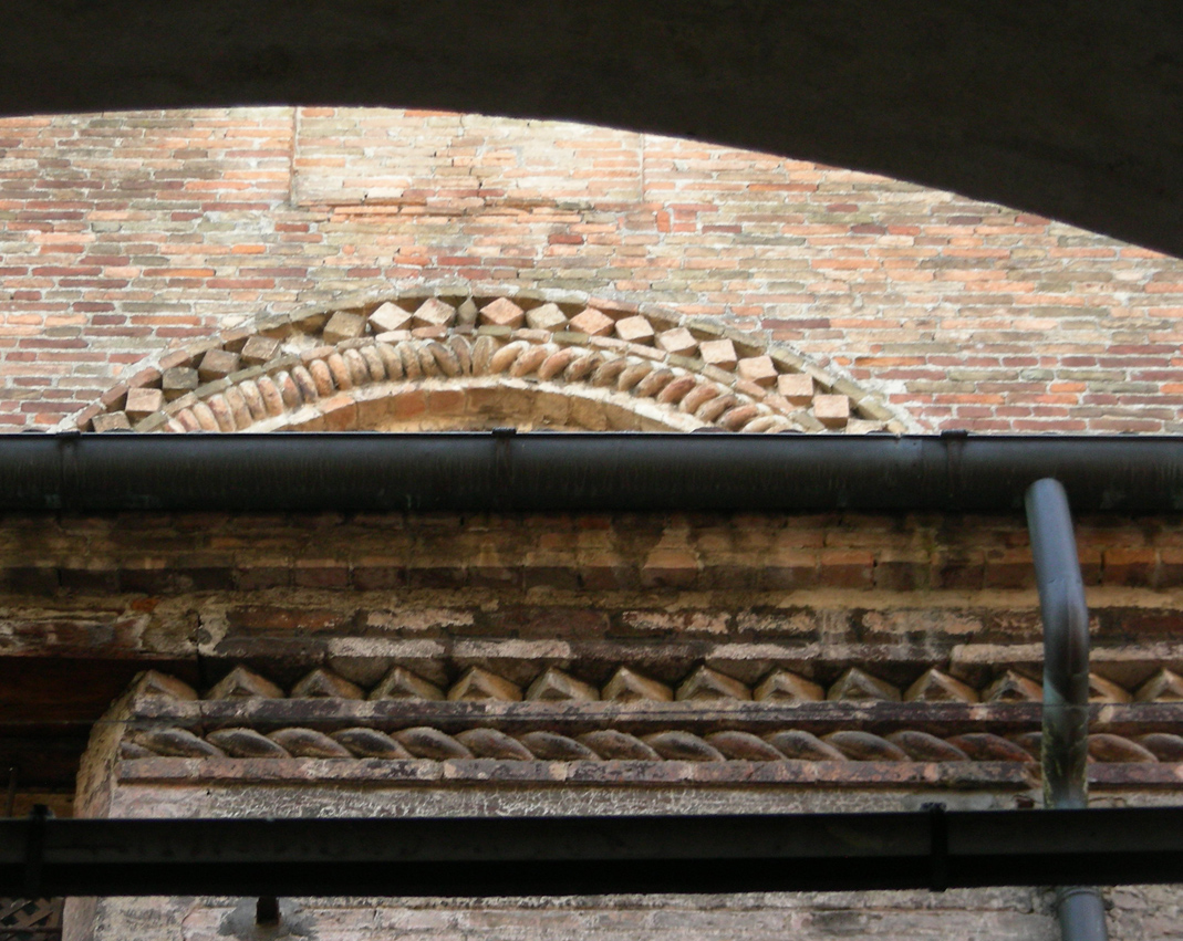 Padova, chiesa di San Francesco, particolare della decorazione della facciata